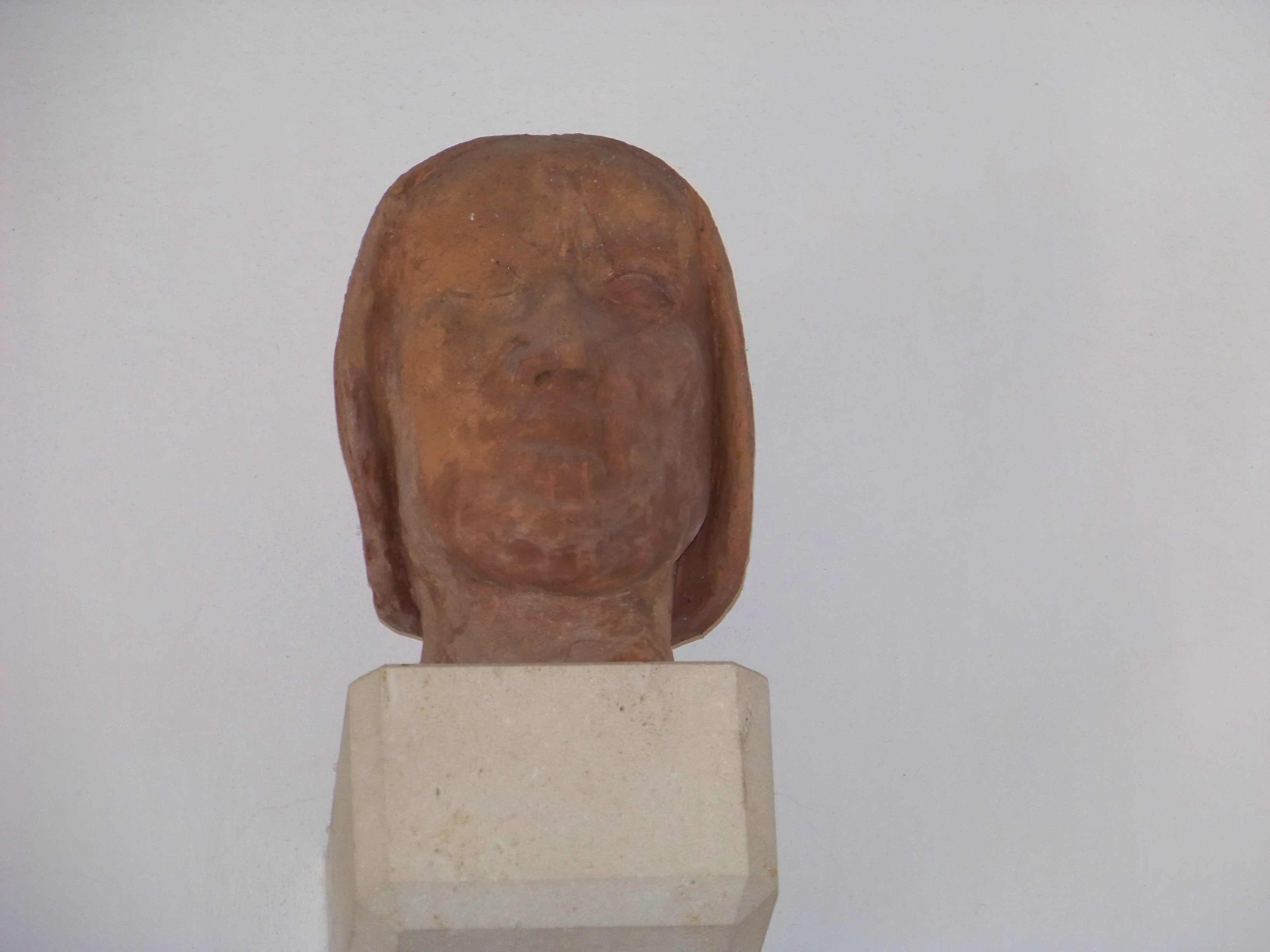 Geisenhausen, Martin-Zeiler-Straße 2. Katholische Pfarrkirche St. Martin. Theobaldskopf oder Steinkopf des Baumeisters.